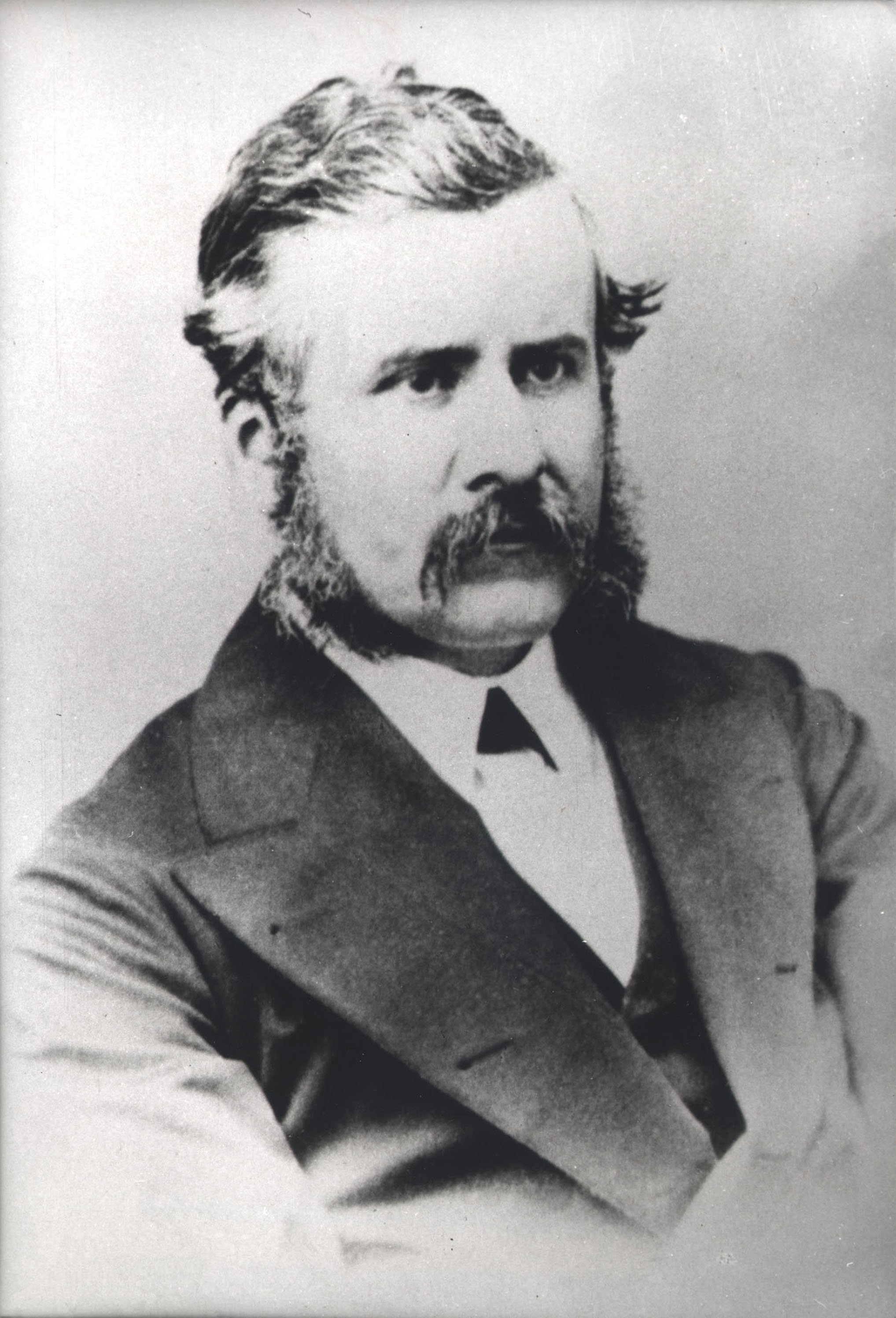 José Andrés Alfonso Cavada (La Serena; 4 de febrero de 1832 – Santiago; 23 de marzo de 1909) Juez y político chileno.